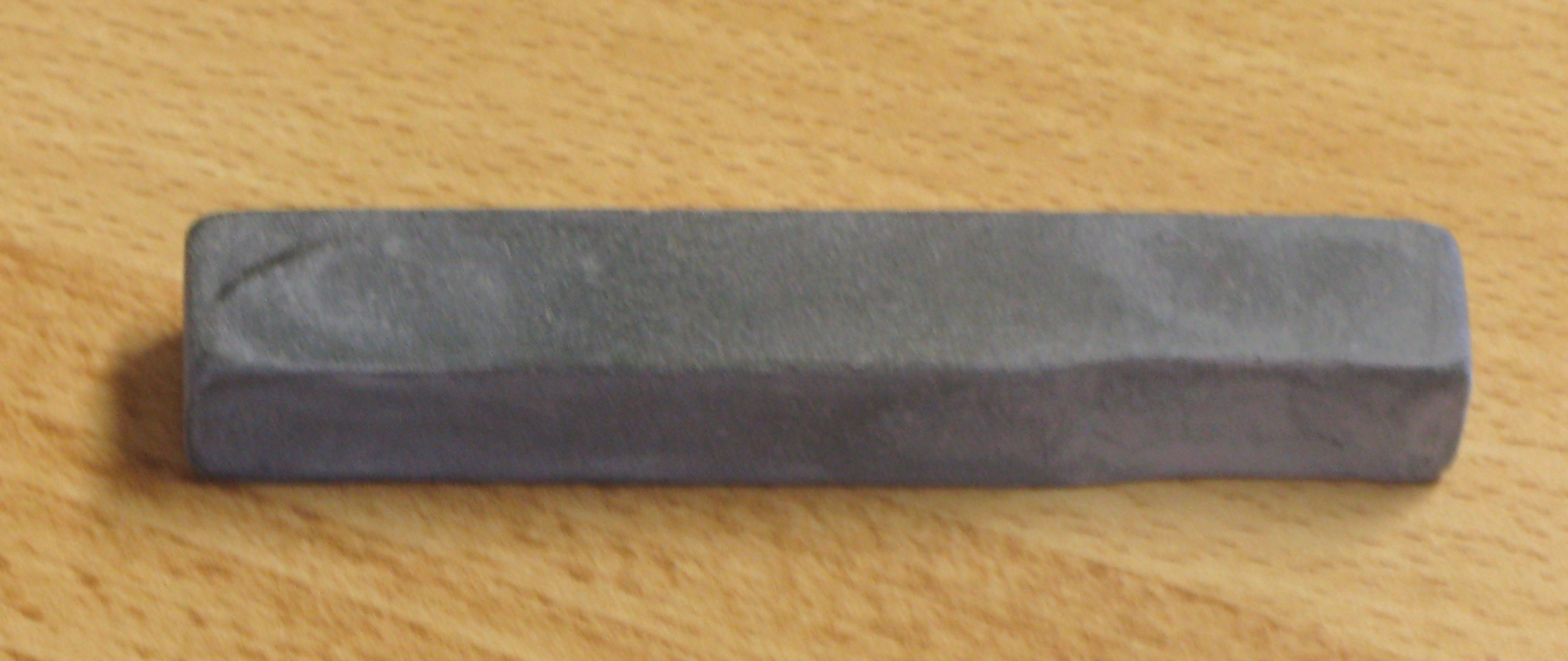 Klenge Wetzsteen vu Laguiole fir Messeren Kategorie:Messeren